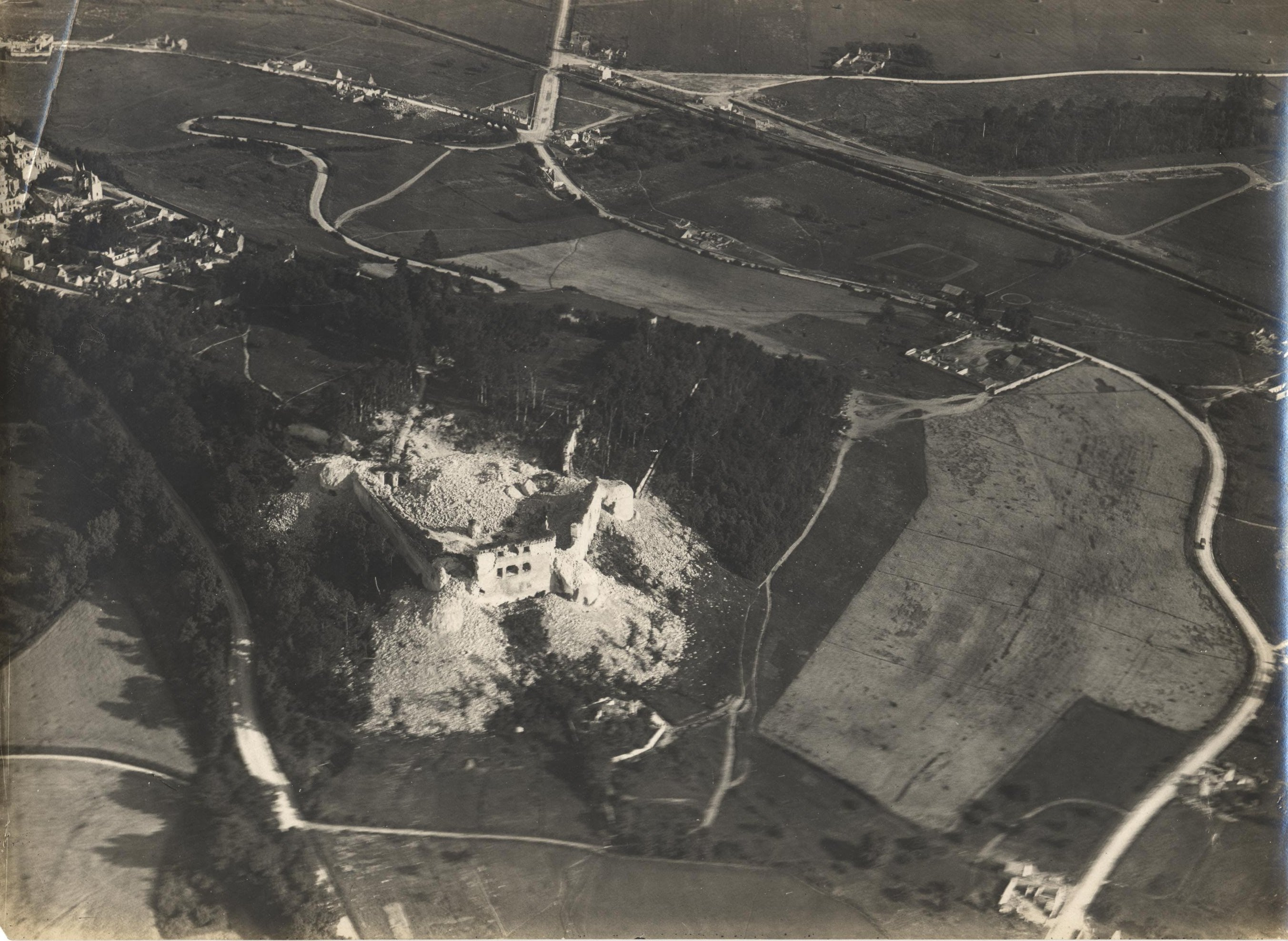 Château de Coucy le 29 juin 1917. Source : vue aérienne militaire (collection personnelle).